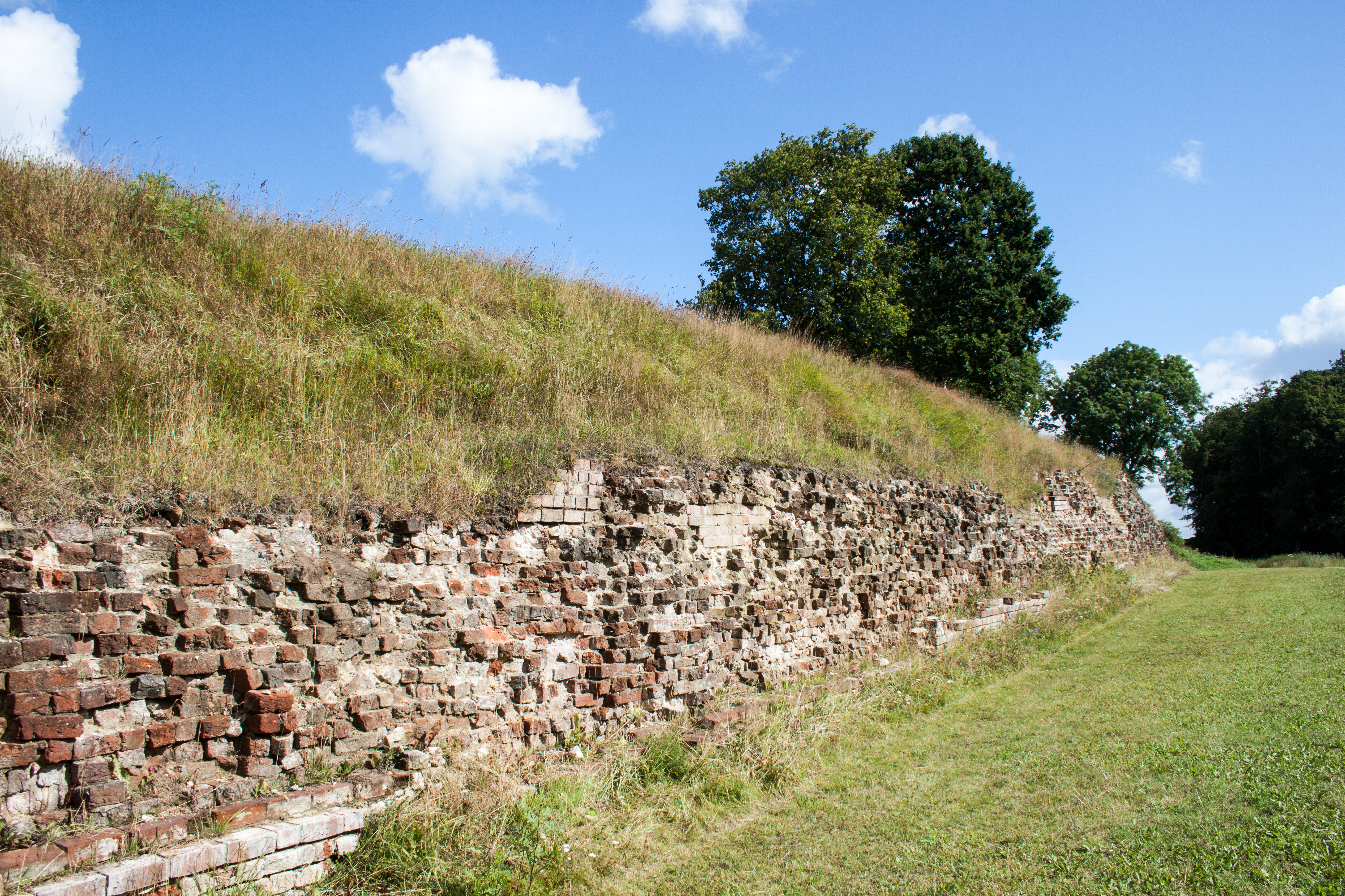 Danevirke, Valdemar's Wall